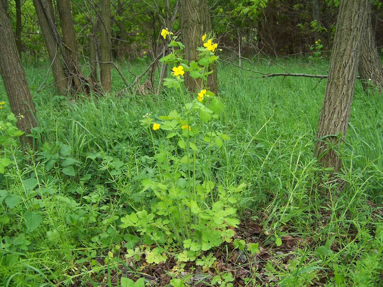 Chelidonium majus (pl. glistnik jaskółcze ziele)